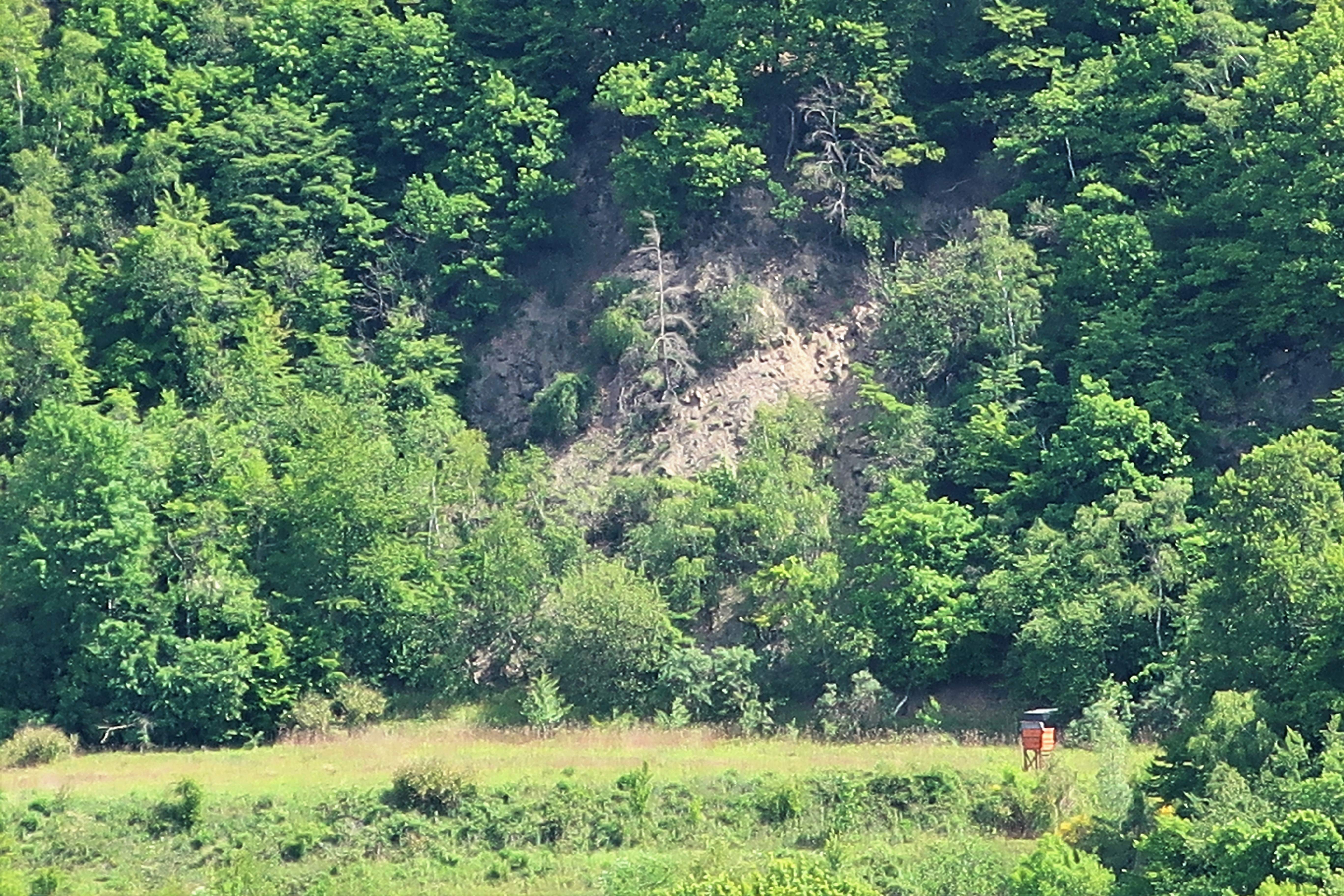 Geschützter Landschaftsbestandteil „Ehemaliger Steinbruch Scheveberg“ in Hagen-Delstern, zwischen Delsterner Straße und A 45. Ehemaliger Steinbruch in den Unteren Honseler Schichten, der teilweise verfüllt ist. Das Gebiet umfaßt die Steilwand und den östlich und südlich angrenzenden Waldbestand mit einem Quellbereich. Im Landschaftsschutzgebiet Asmecker Bachtal gelegen.